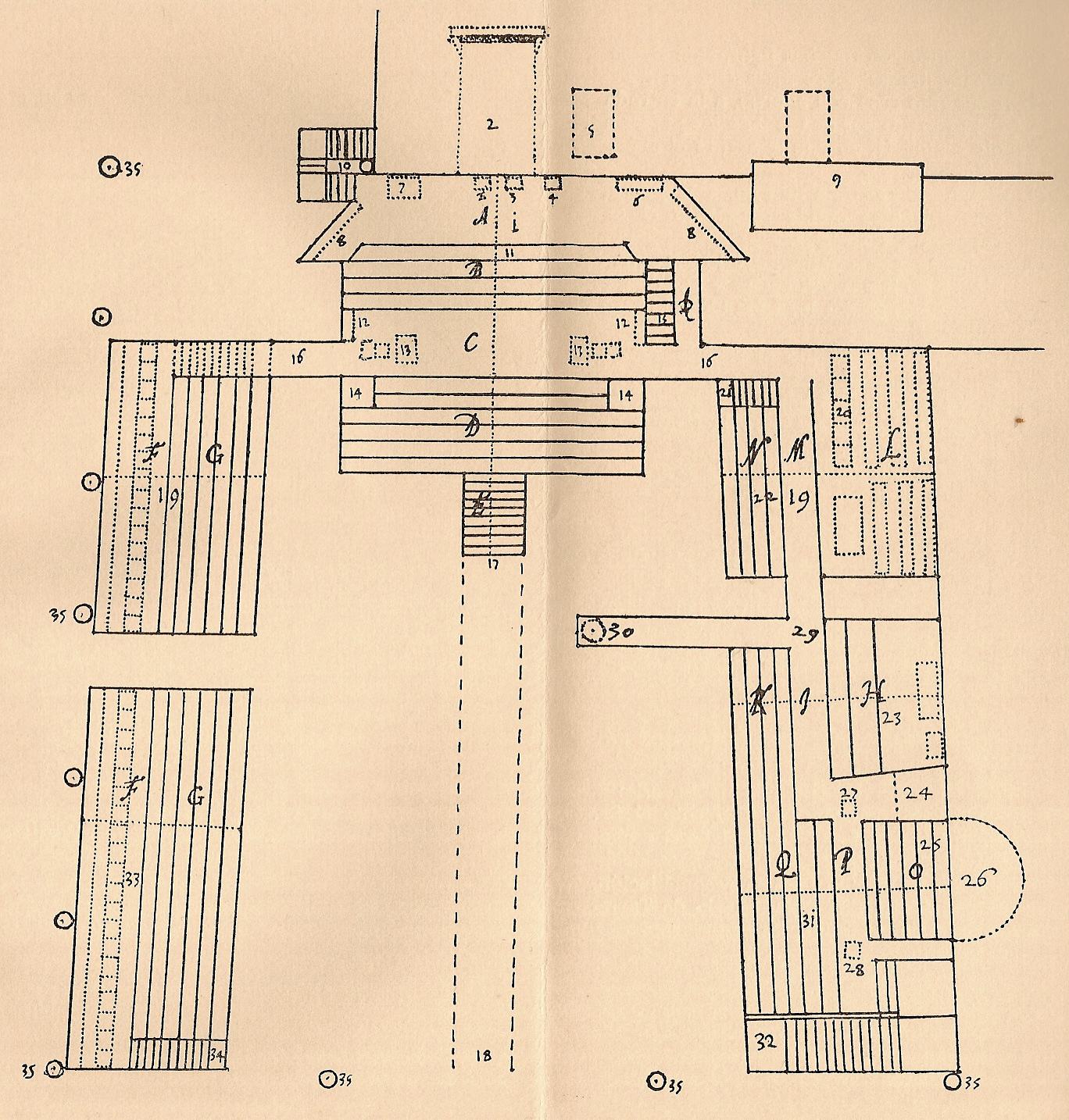 Planol de l'entaulat de l'acte de fe de 1675 celebrat a Mallorca.